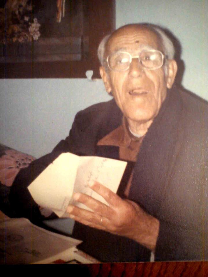 Bendebbagh, enlumineur, miniaturiste algérien